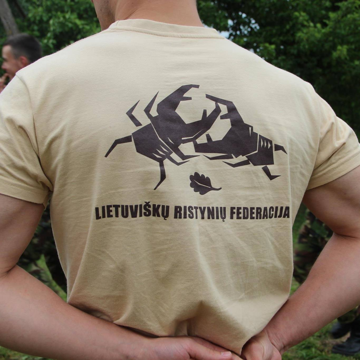 Lietuviškų ristynių federacijos logotipas